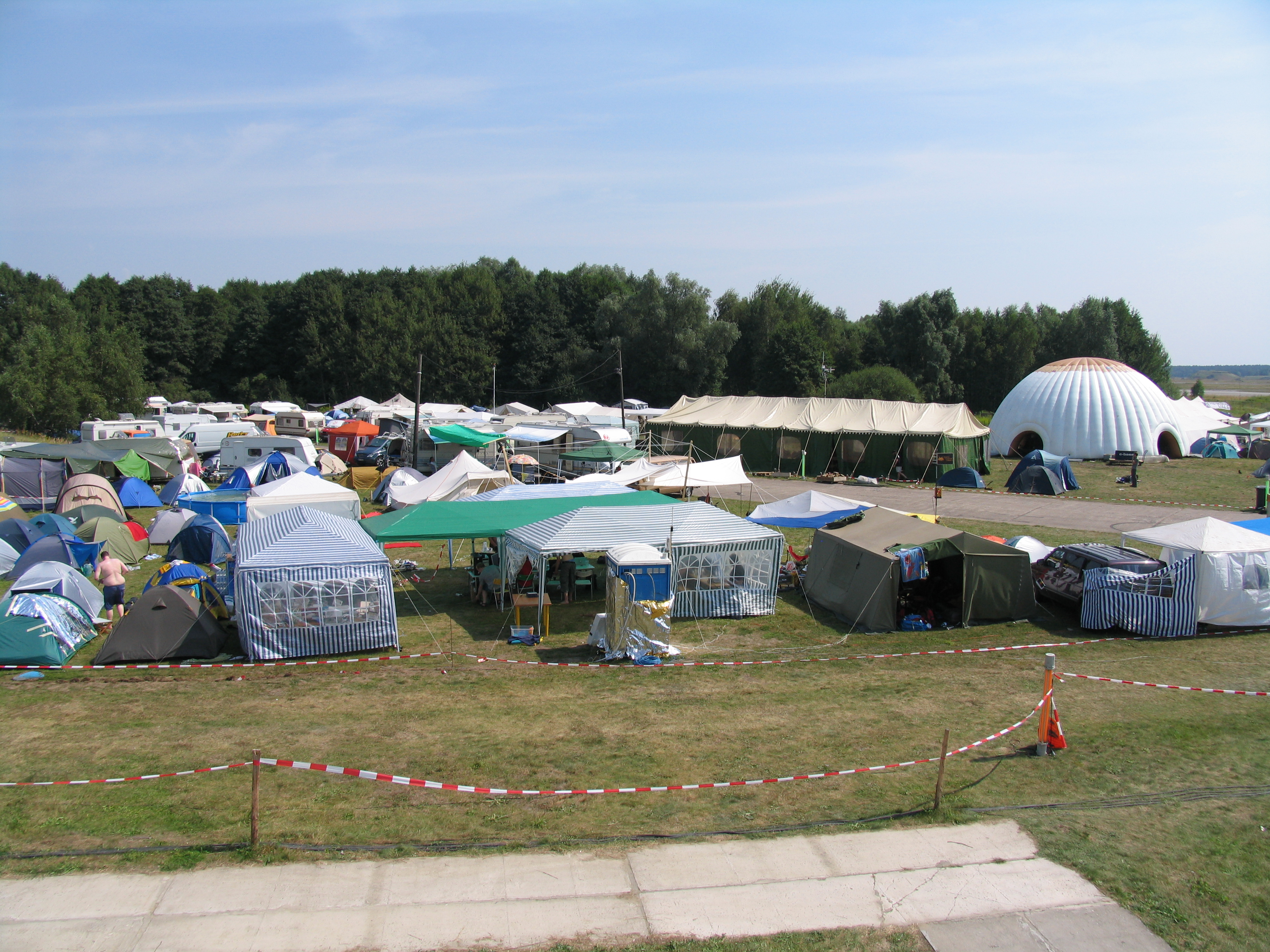 Ein Teil des Zeltbereichs, Chaos Communication Camp, Finowfurt 2007 (mittig ein „Datenklo“, rechts das C-base-Zelt)